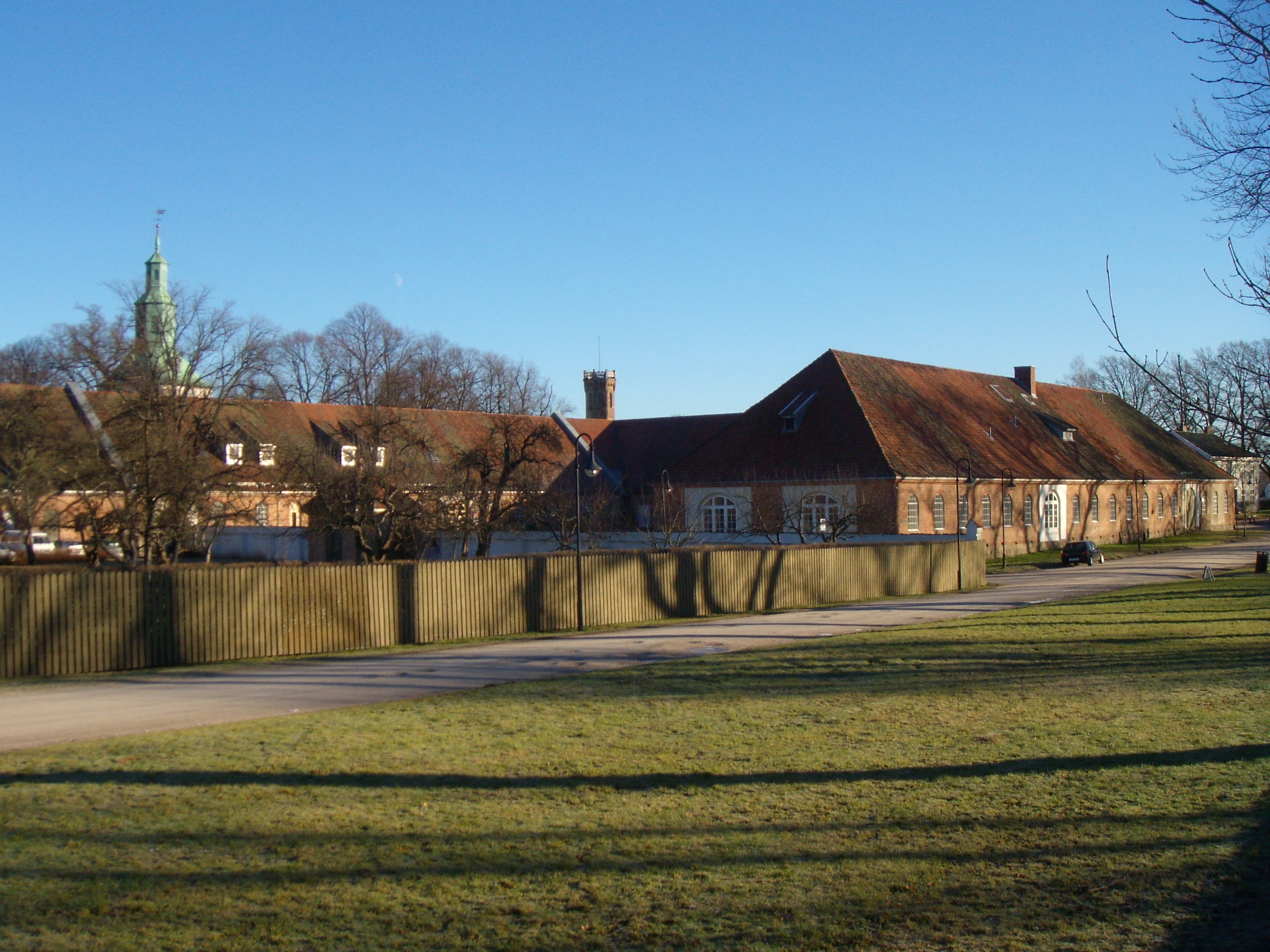 Tøihuset, Tøihusgaten 41 i Gamlebyen i Fredrikstad.